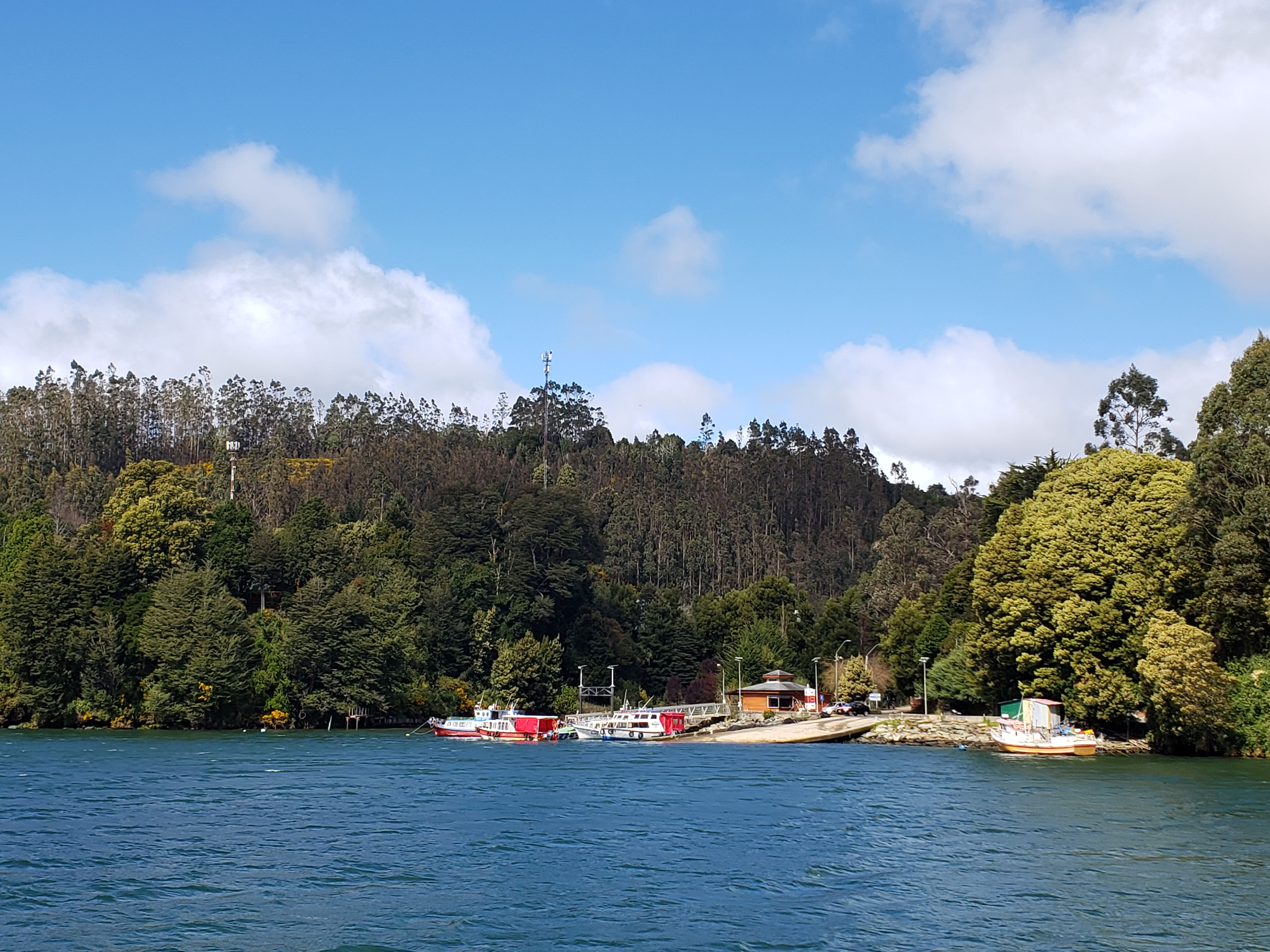 Asentamiento en Isla del Rey, Valdivia, Chile